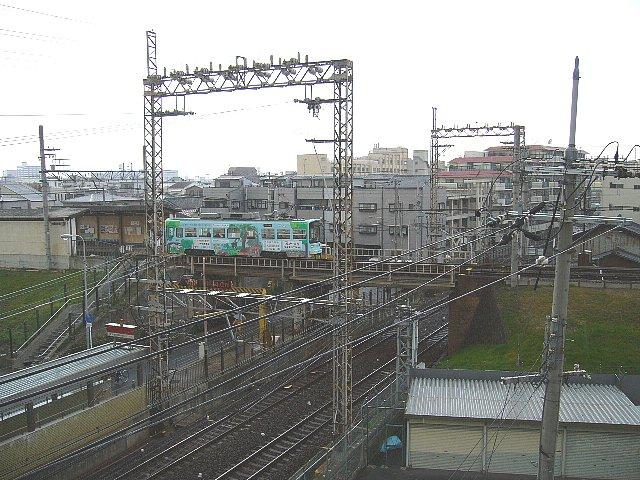 阪堺電気軌道上町線 神ノ木停留場 下はja:南海高野線